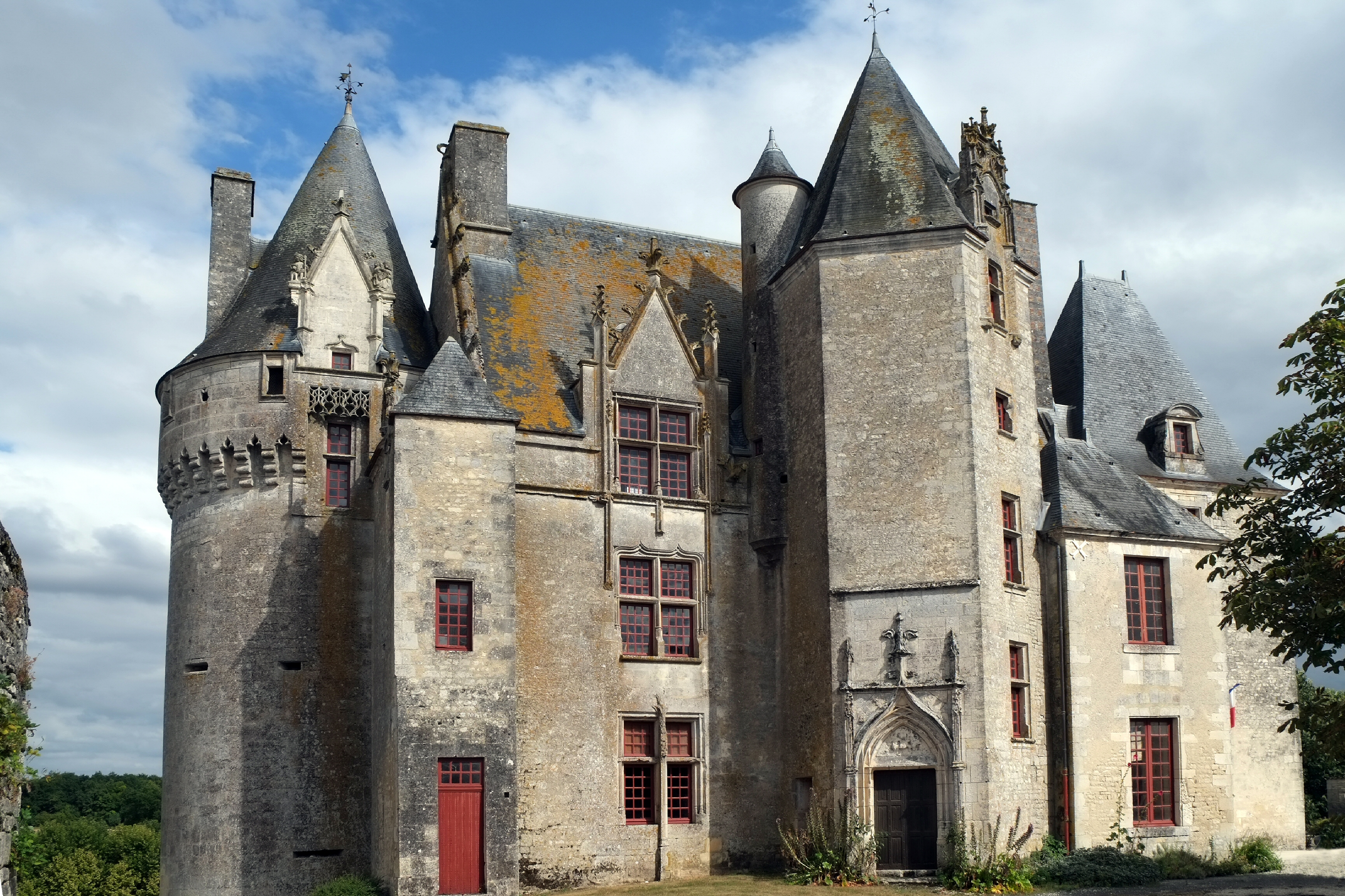 Château Neuvicq-le-Château Charente-Maritime France